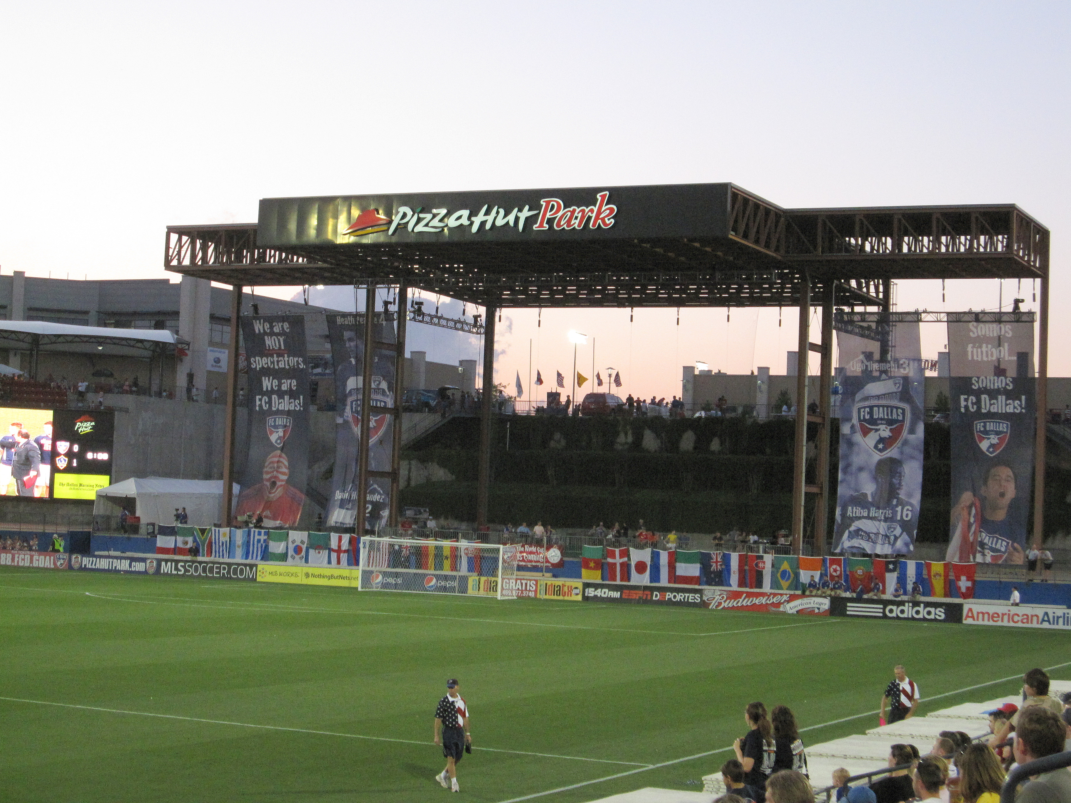 Pizza Hut Park